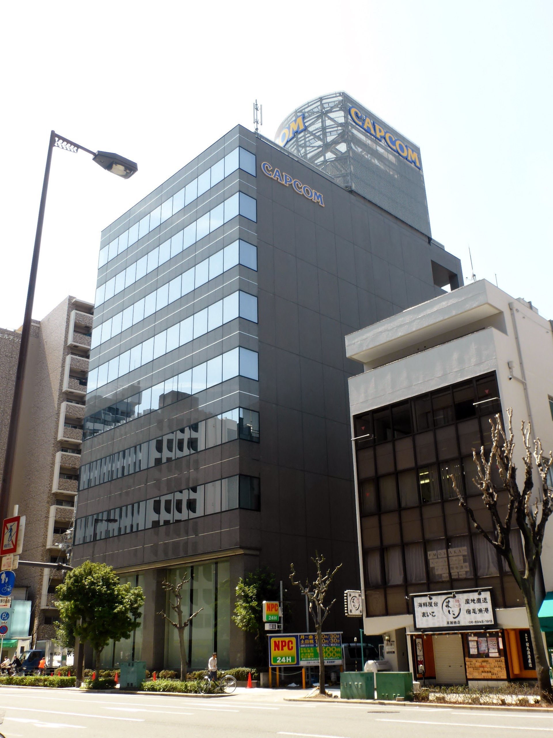 カプコン本社を撮影